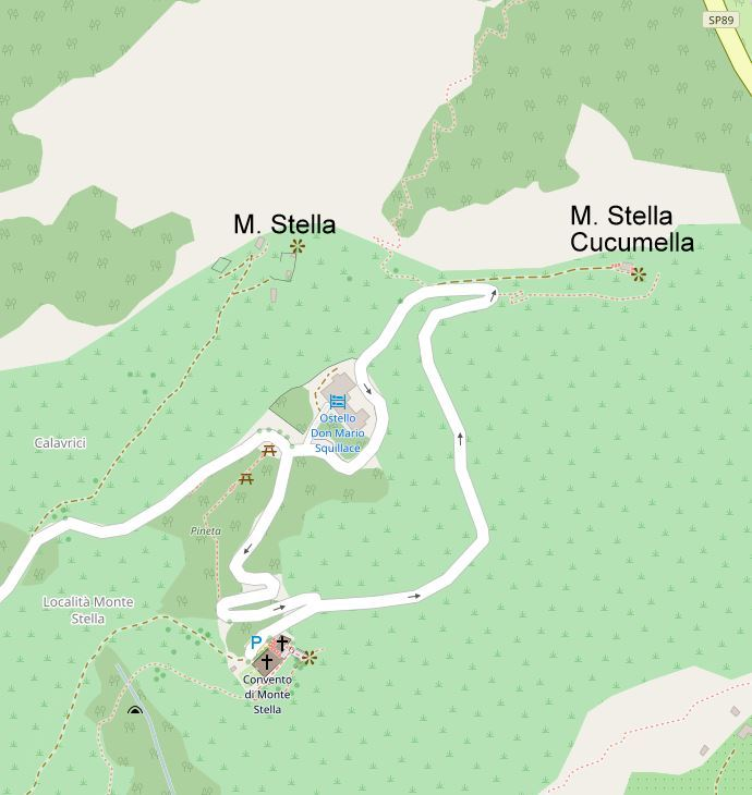 Mappa Vette Stella e Stella - Cucumella con antenne